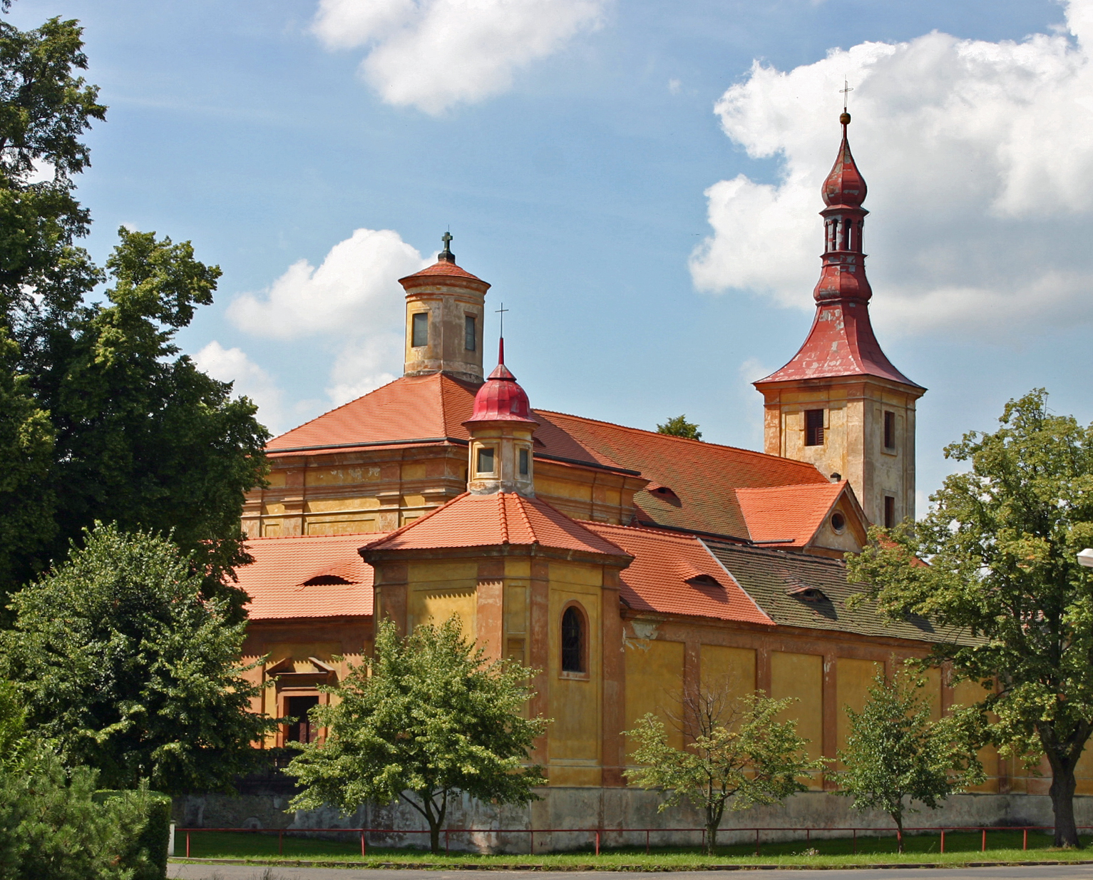 Kostel v Mariánských Radčicích v okrese Most.